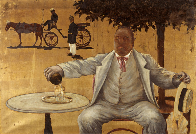 Vattenserveringen i Kungsträdgården. Bildkonst Väggfält från Restaurant Du Nord Konstnär: Andrén, Victor (Vicke) Material och teknik: Olja Underlag: Duk Mått i mm: 970X1390